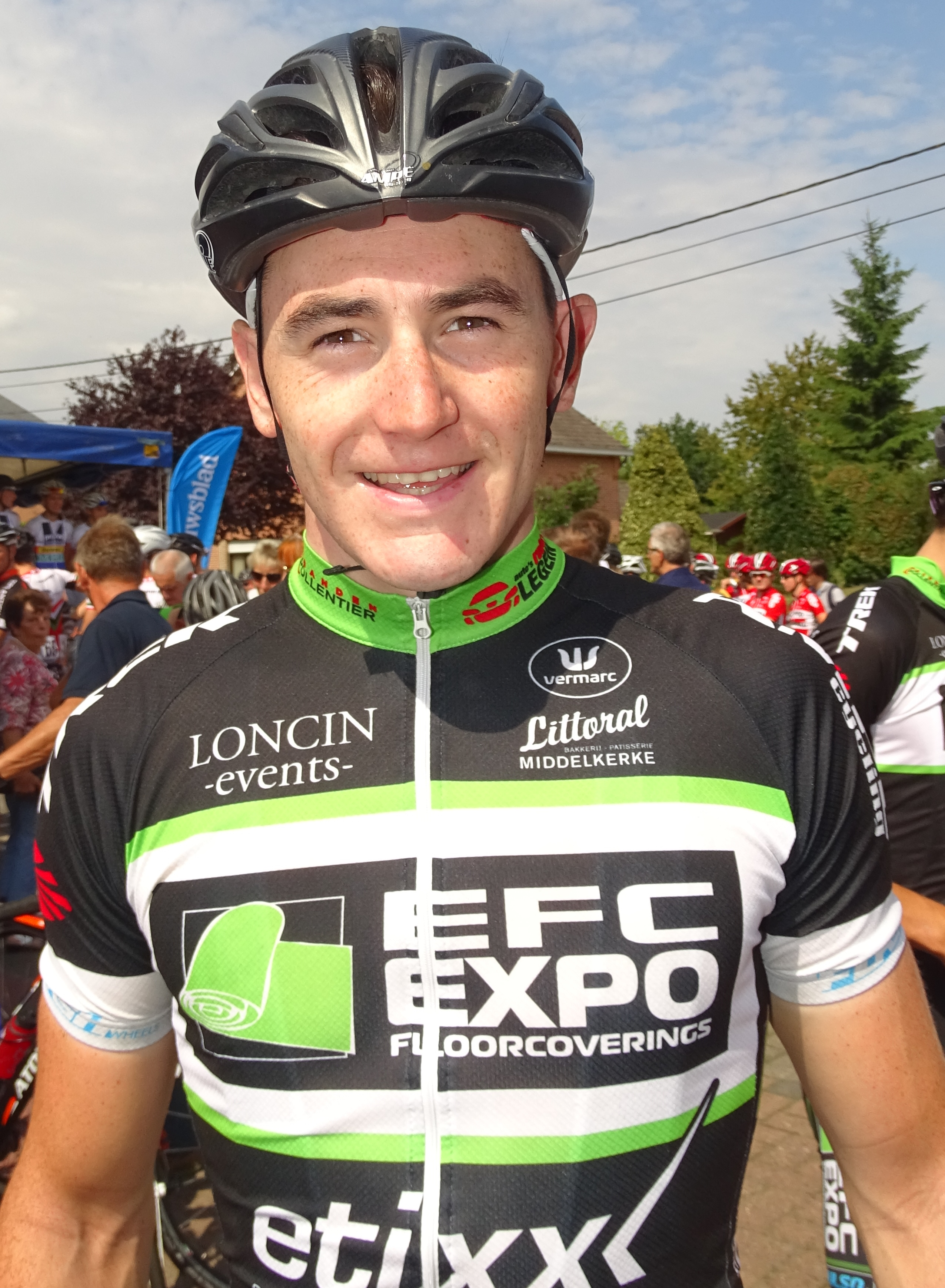 Reportage réalisé le jeudi 20 août à l'occasion du départ et de l'arrivée de la deuxième étape du Tour de Flandre-Orientale 2015 à Sinaai (Saint-Nicolas), Belgique.